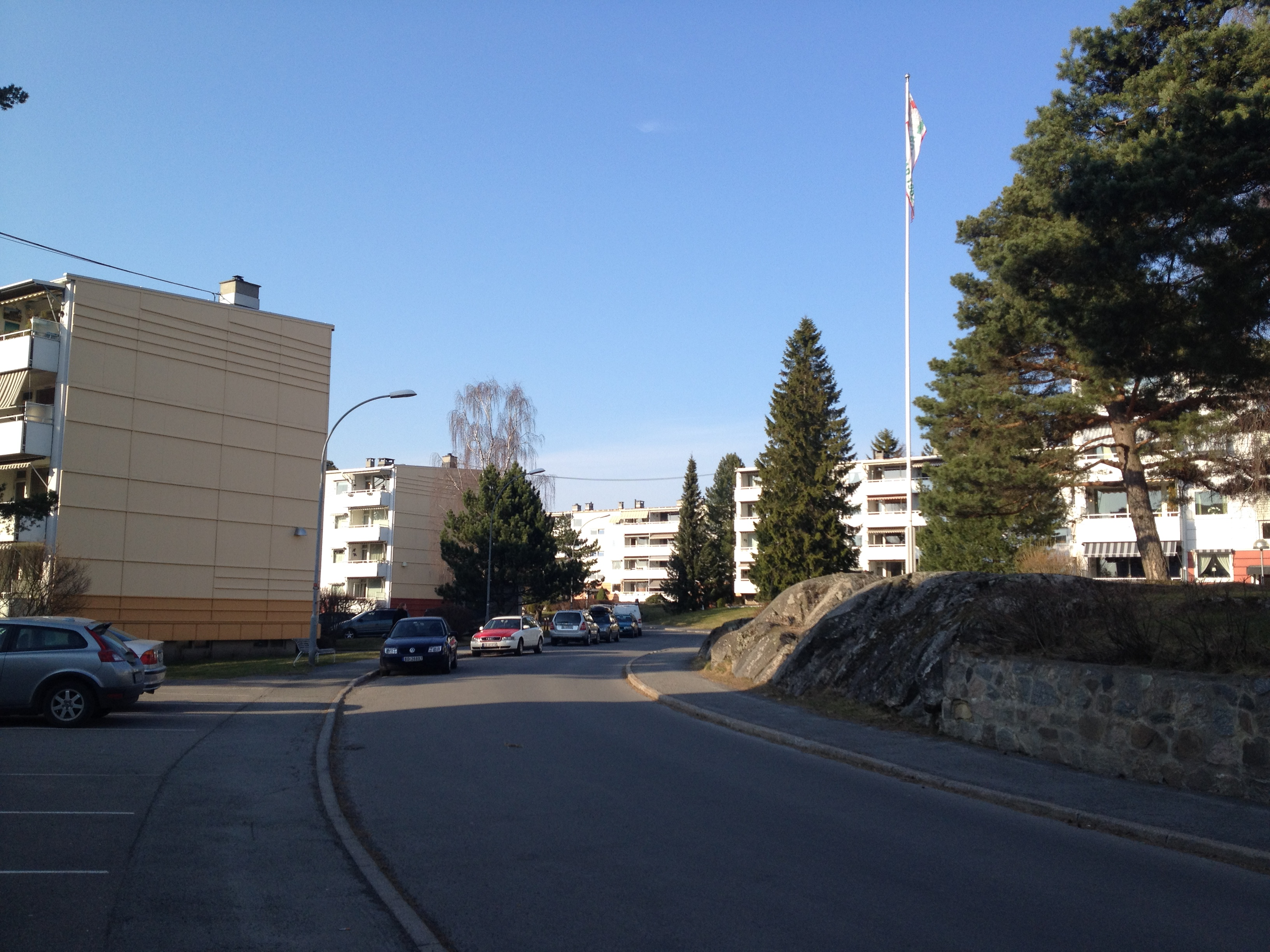 Rustadgrenda i Oslo.